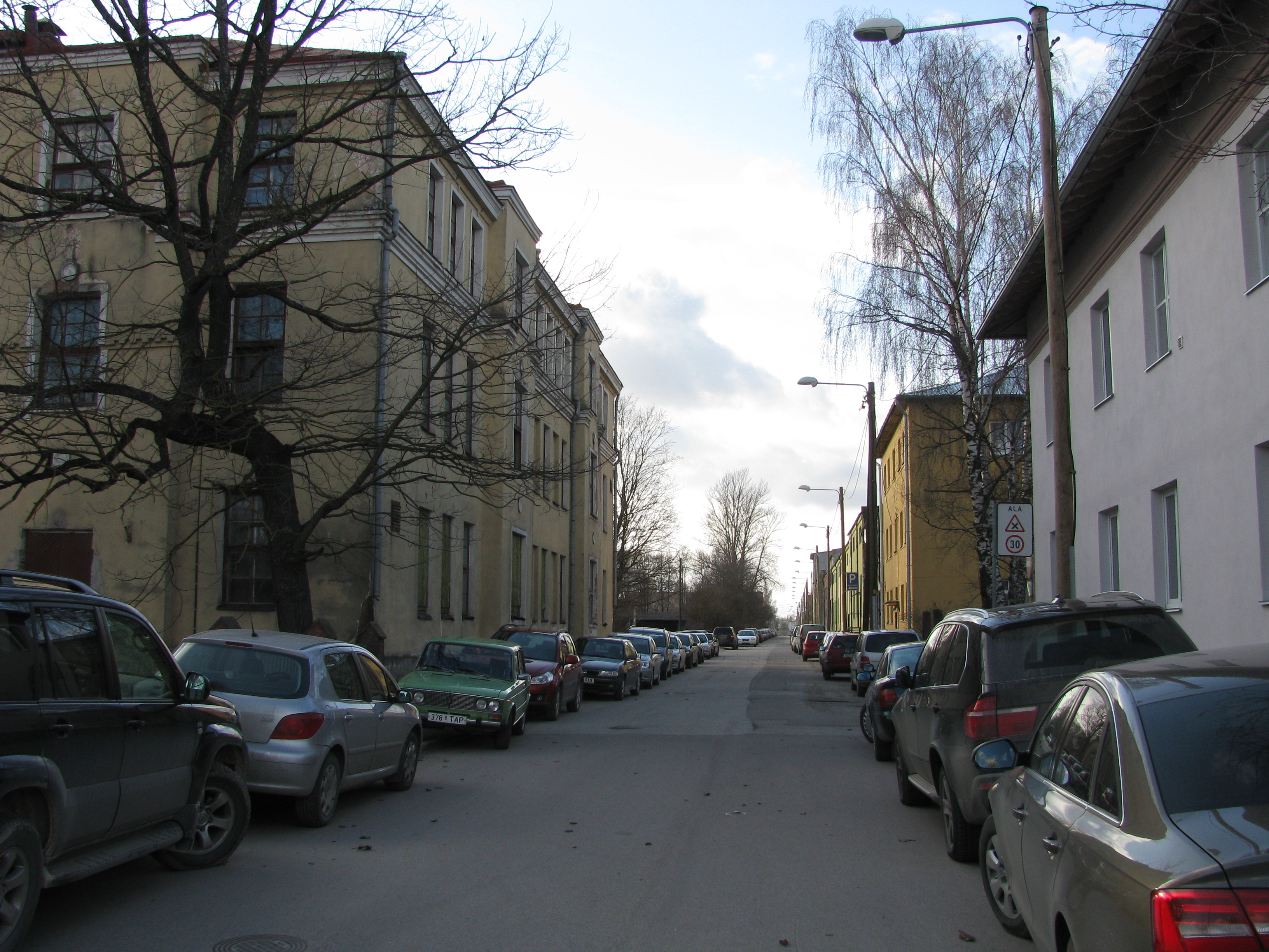 Peetri tänav Tartus